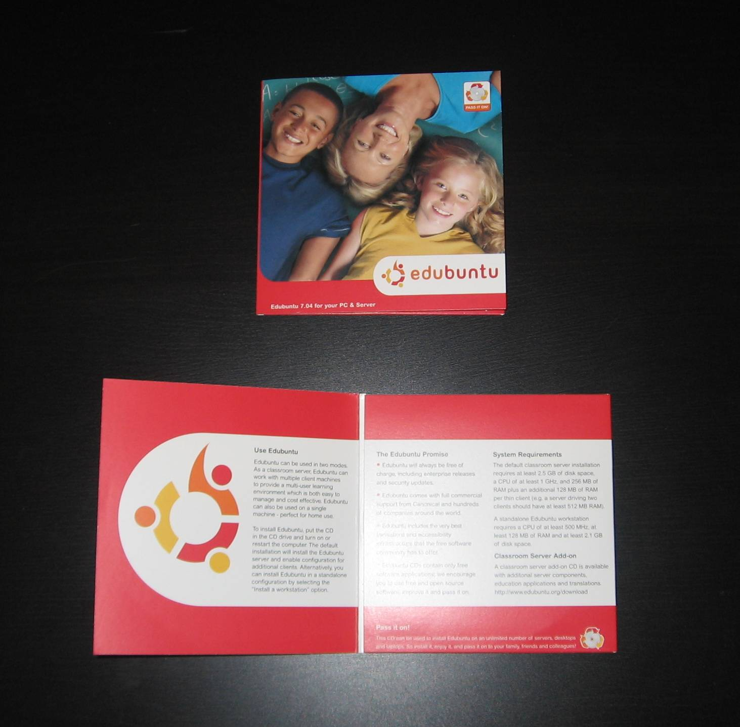 Edubuntu 7.04 versión CDs. CDs de la versión 7.04 de Edubuntu.